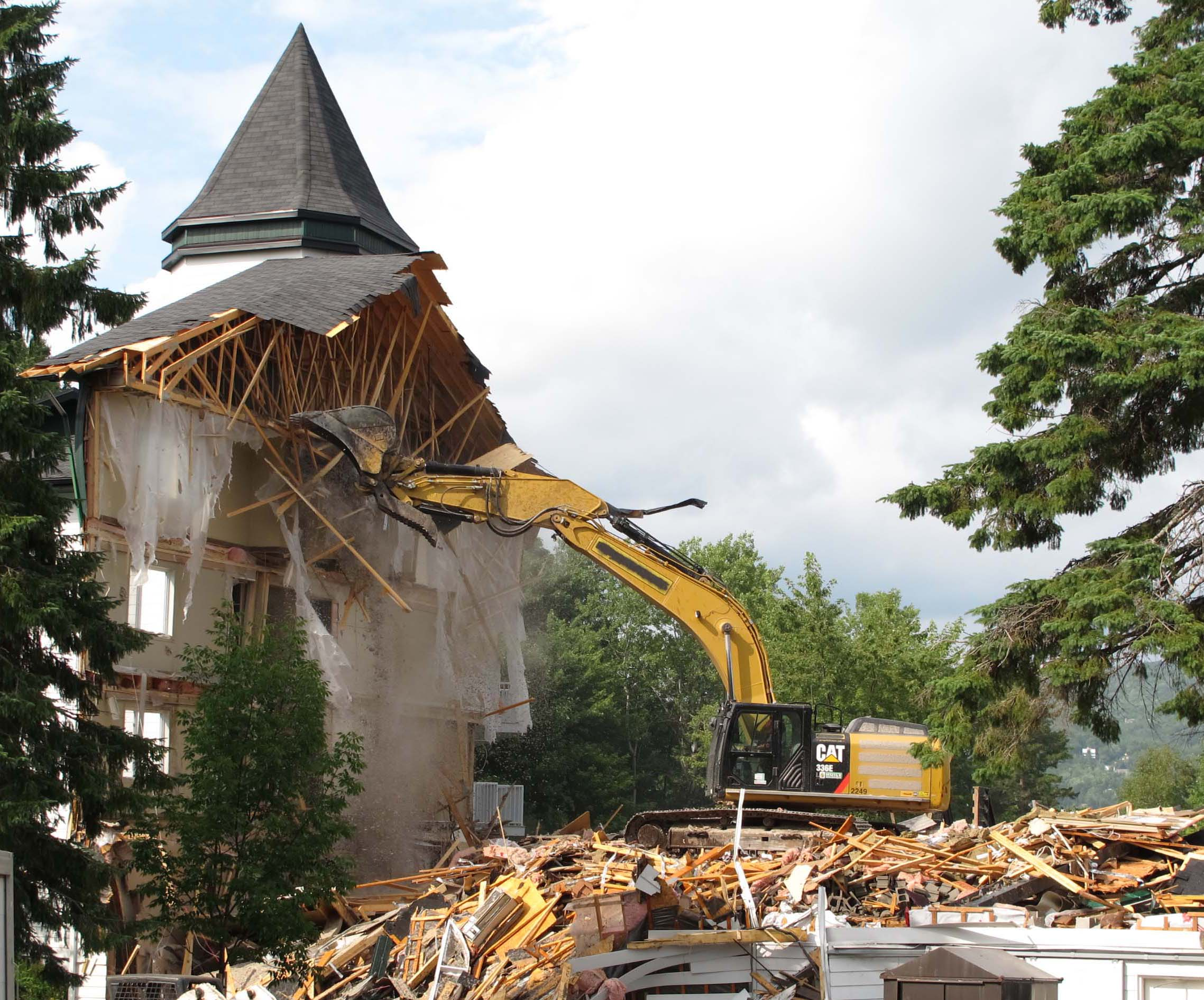 Démolition du Manoir St-Castin en 2014. Construit en 1938, l'hôtel comptait 104 chambres. C'était le dernier établissement hôtelier de Lac-Beauport.